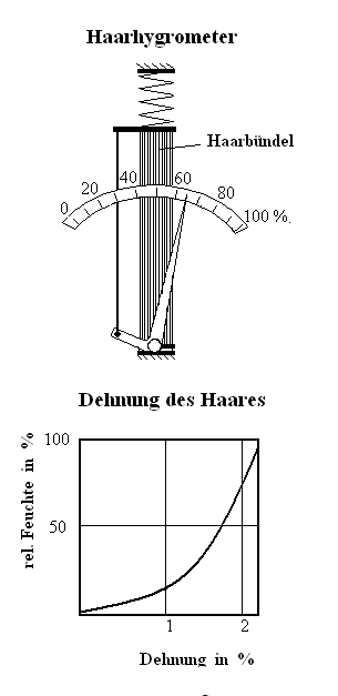 geändert